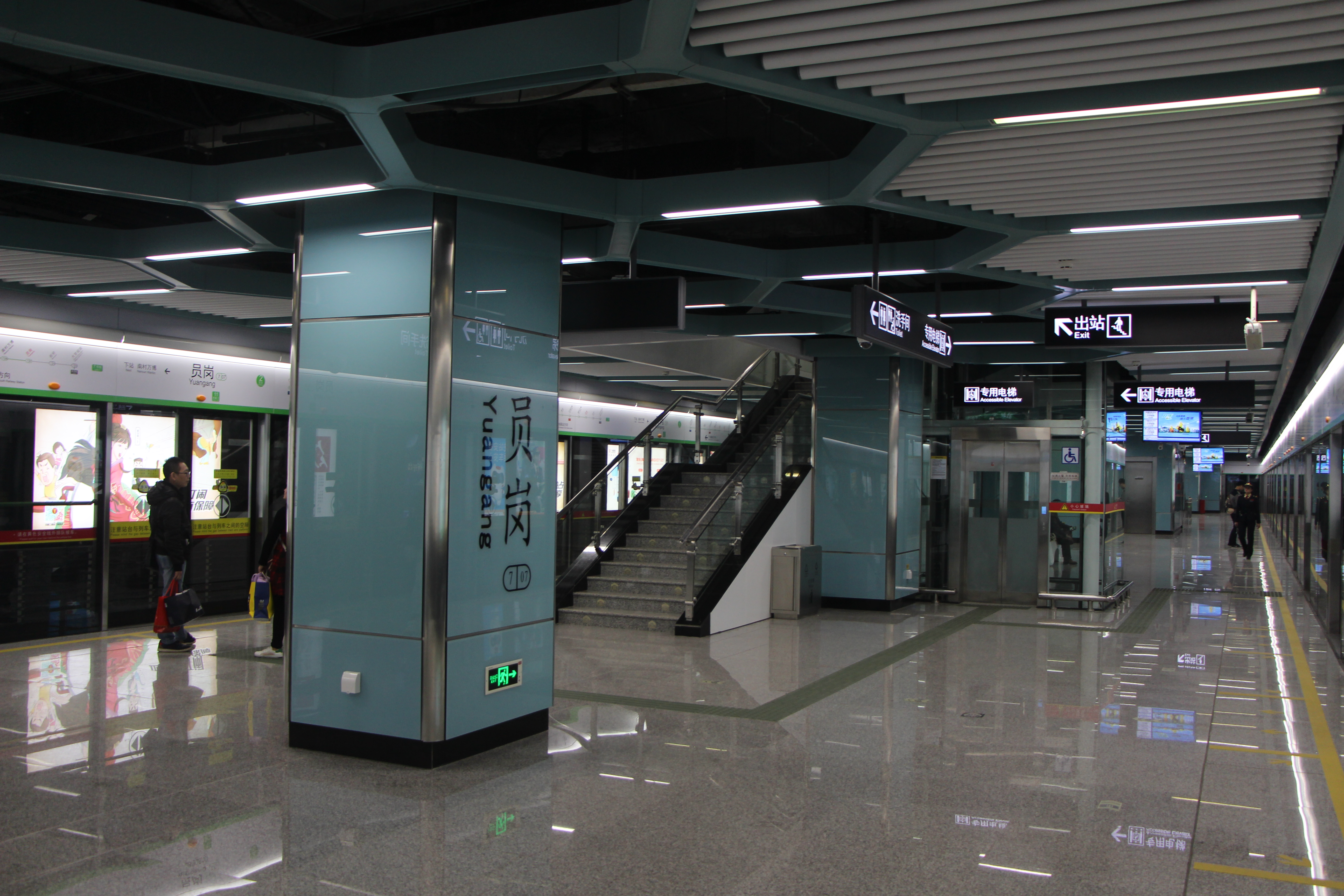 广州地铁员岗站